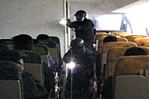 特殊部隊（ＳＡＴ）の訓練